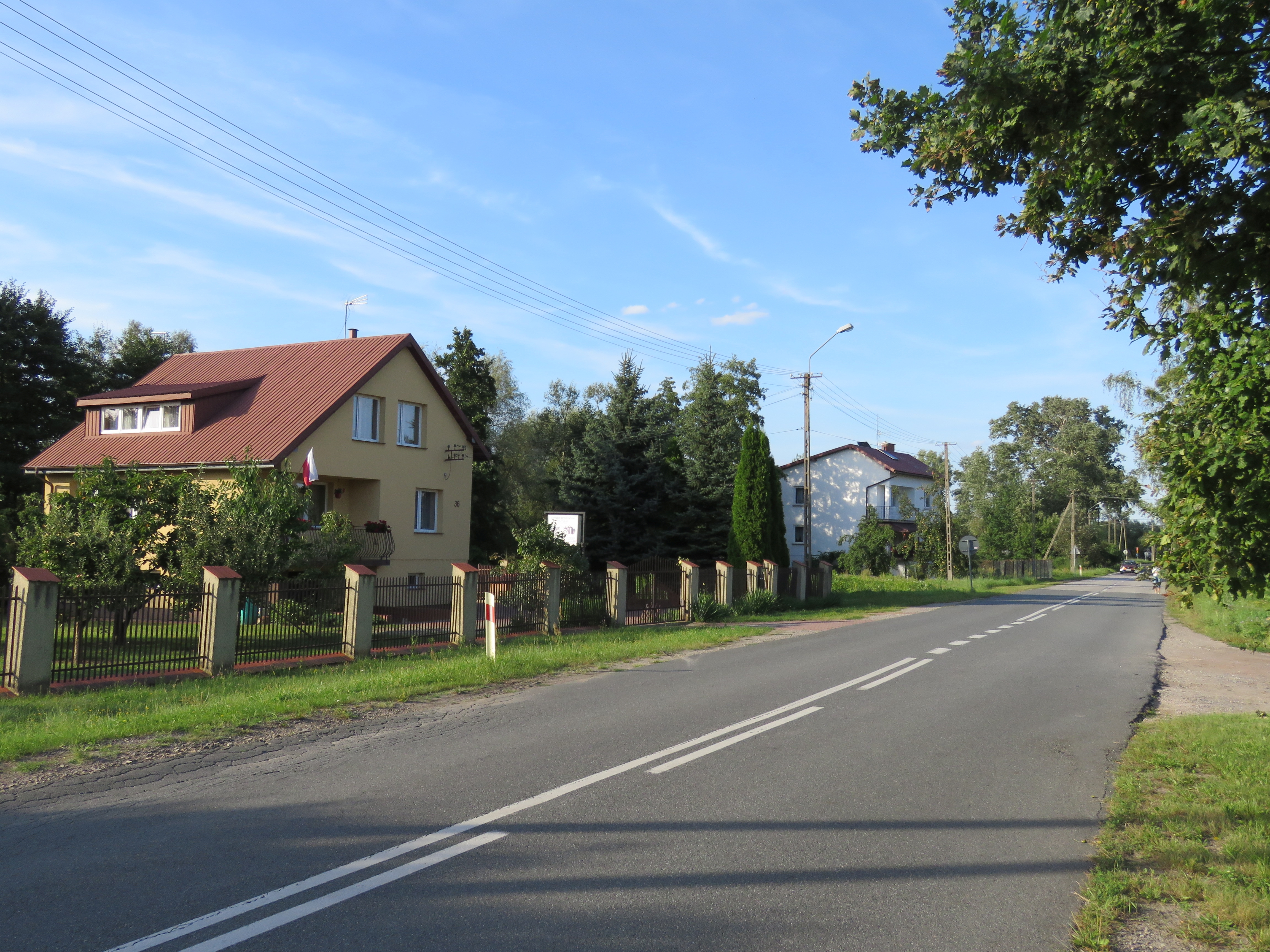 Nowiny, gmina Leoncin